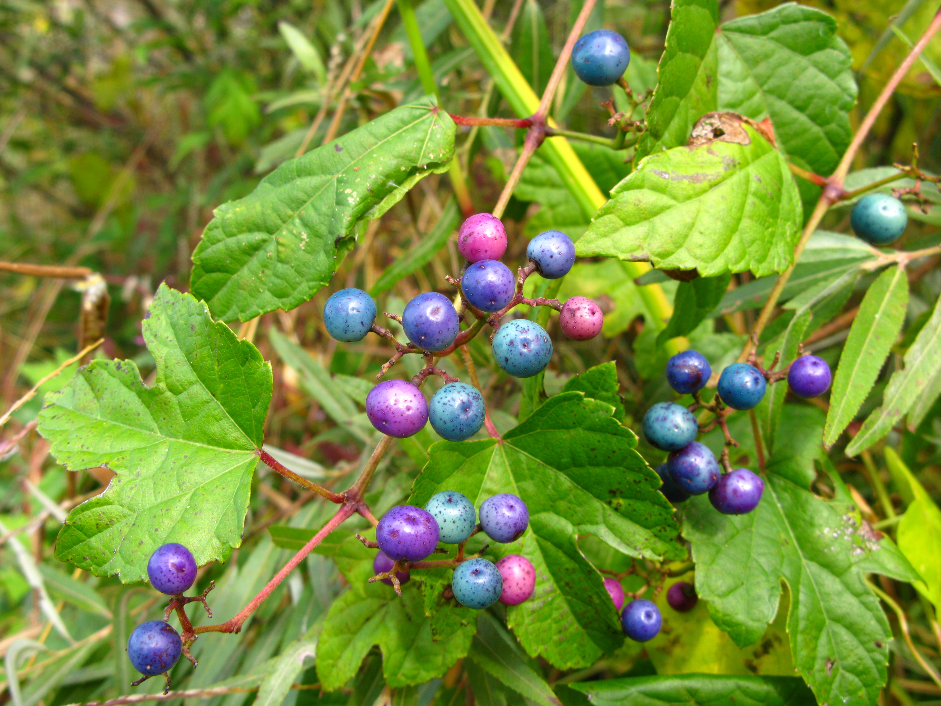 Ampelopsis_glandulosa_var._heterophylla ノブドウ 福島県会津地方